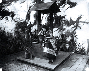 Gene Gauntier